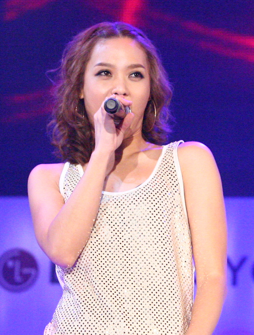 LG전자가 29일 저녁 잠실 올림픽공원에서 ‘제 4회 CYON 비보이 챔피언십 2010’ 본선대회를 열었다. ‘07년에 시작된 이 행사는 올해로 4회째를 맞는 명실상부 국내 최대 비보이 축제로 자리잡았다. 이날 행사에서는 3,000여 명의 관람객들이 참석한 가운데, 비보이들의 화려한 댄스 배틀과, 은지원, 에픽하이, 타이거JK, 윤미래, 앰블랙, 슈프림팀 등 국내 인기 가수들이 참여한 ‘롤리팝 콘서트’가 함께 진행됐다. 5월부터 전주, 부산, 서울에서 열린 예선에 참가한 83개 팀간 치열한 경합 끝에 선발된 8개 팀이 최종승부를 펼쳤다. 치열한 경합 끝에 ‘갬블러 크루(Gamblerz Crew)’가 챔피언에 올라 일천만원의 상금과 함께 향후 1년간 CYON 비보이팀 자격과 공식 후원을 받게 된다. ‘갬블러 크루’는 부산예선 1위팀으로 비보이 월드컵이라 불리는 ‘배틀오브더이어(Battle of the Year)’에 한국대표로 출전, 2004년과 2009년에 우승한 대한민국 대표 비보잉팀이다. LG전자 MC사업본부 한국마케팅팀 신현준 팀장은 “올해 4회째를 맞은 CYON 비보이 챔피언십은 올해도 뜨거운 열기 속에 젊은 세대의 최고 축제가 됐다”며 “YG(Young Generation)세대들을 위한 다양한 문화공감 프로젝트를 지속적으로 추진할 것”이라고 밝혔다.